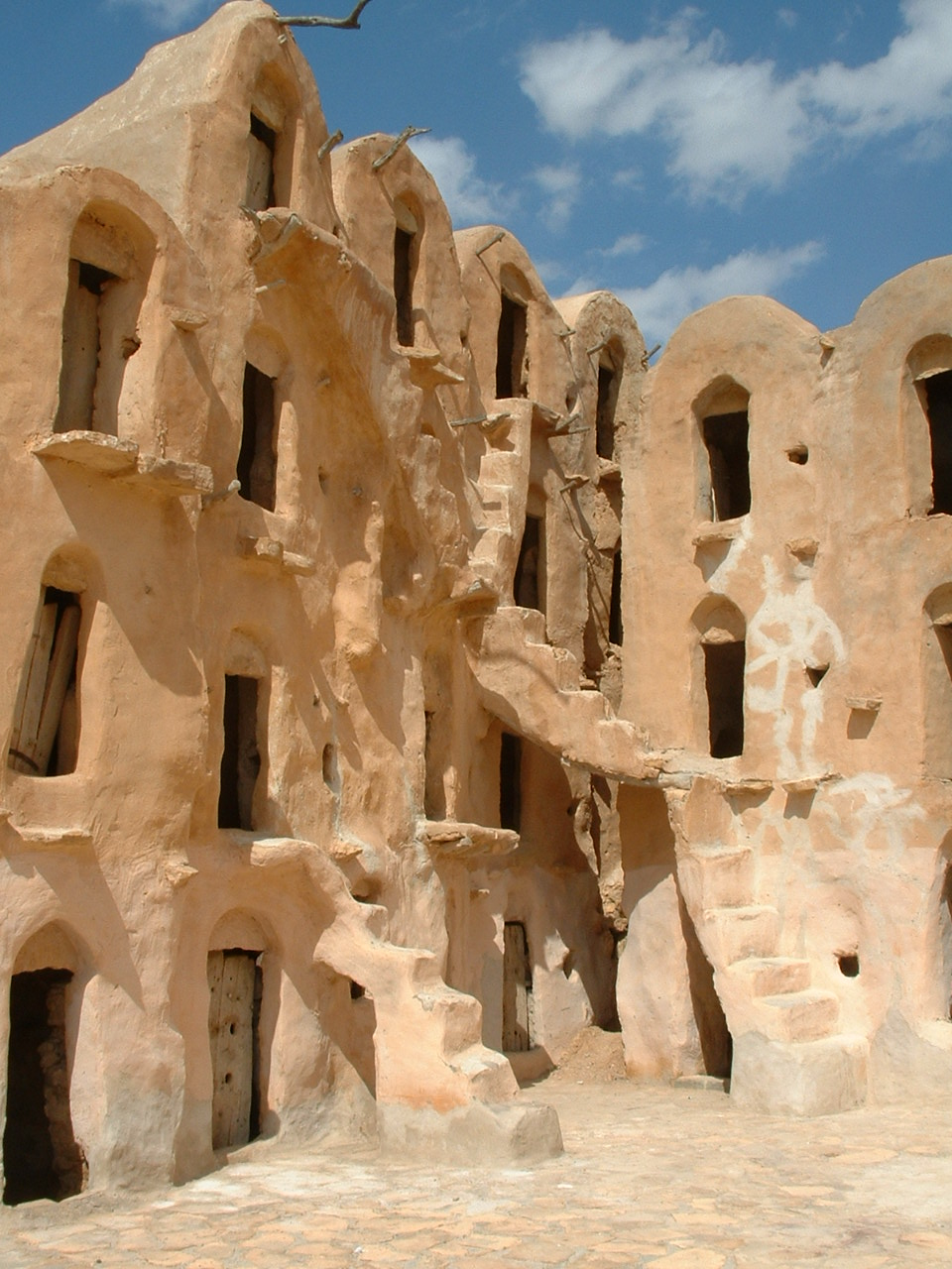 Ksar Ouled Soltane en Tunisie